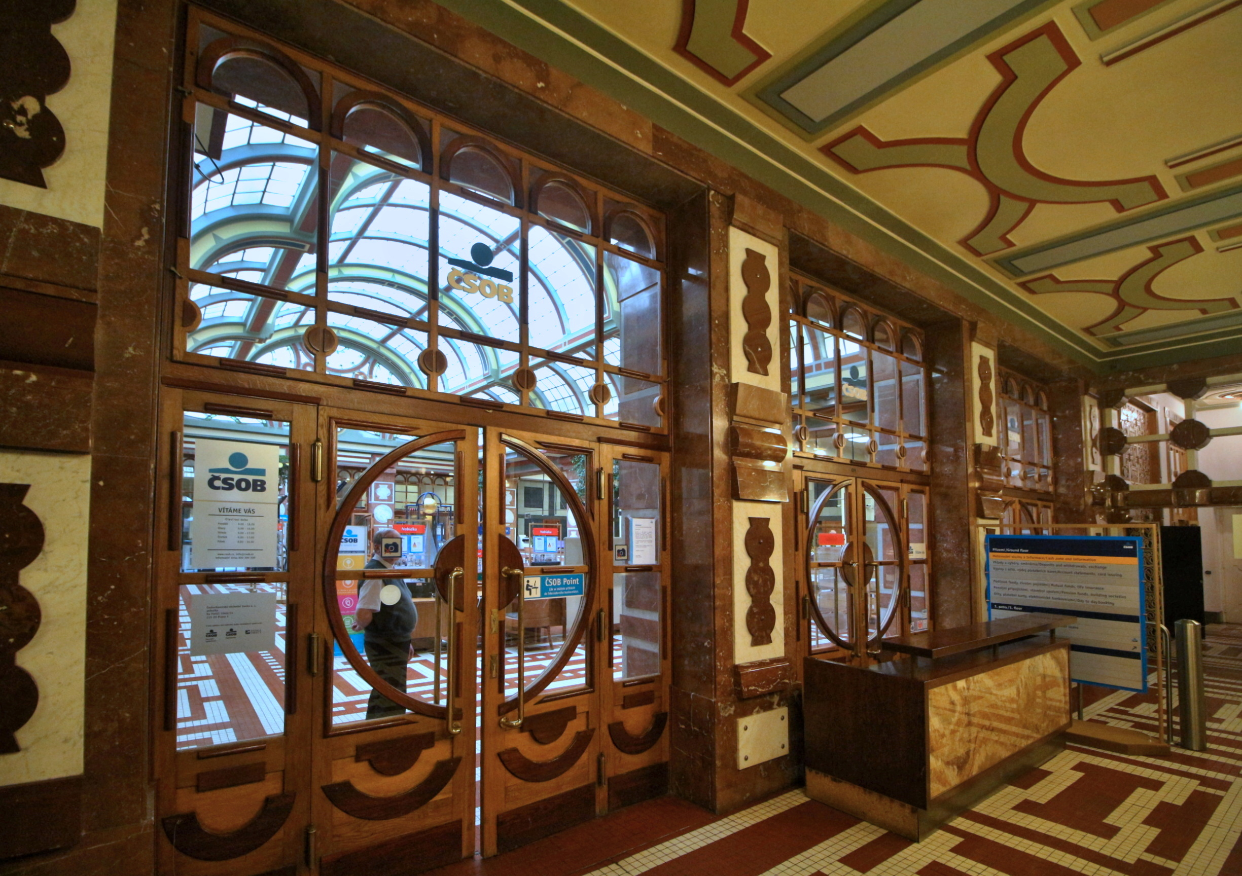 Praha, ulice Na Poříčí, rondokubistická budova banky